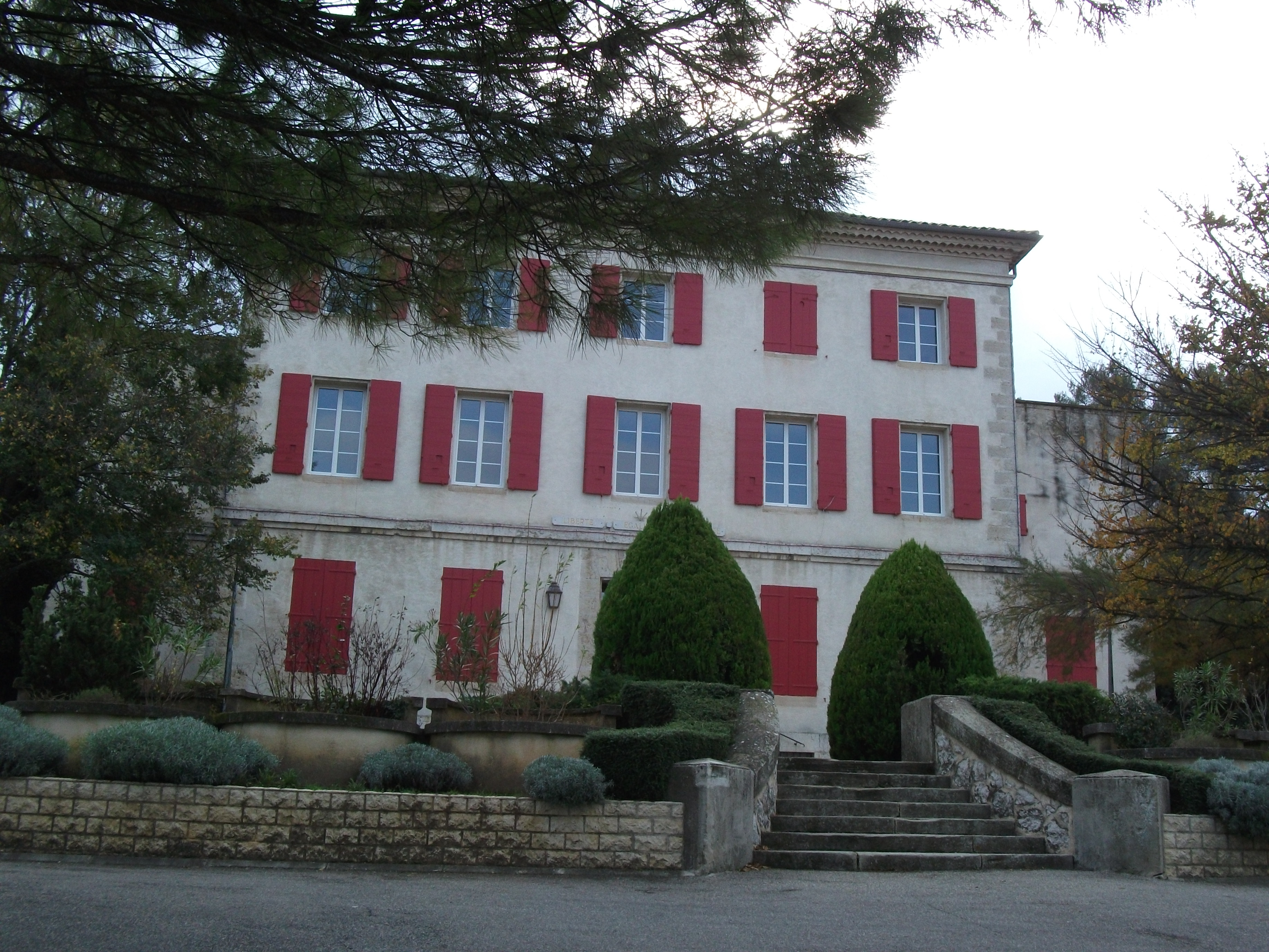 Hôtel de ville de Simiane-Collongue, Bouches-du-Rhône, France